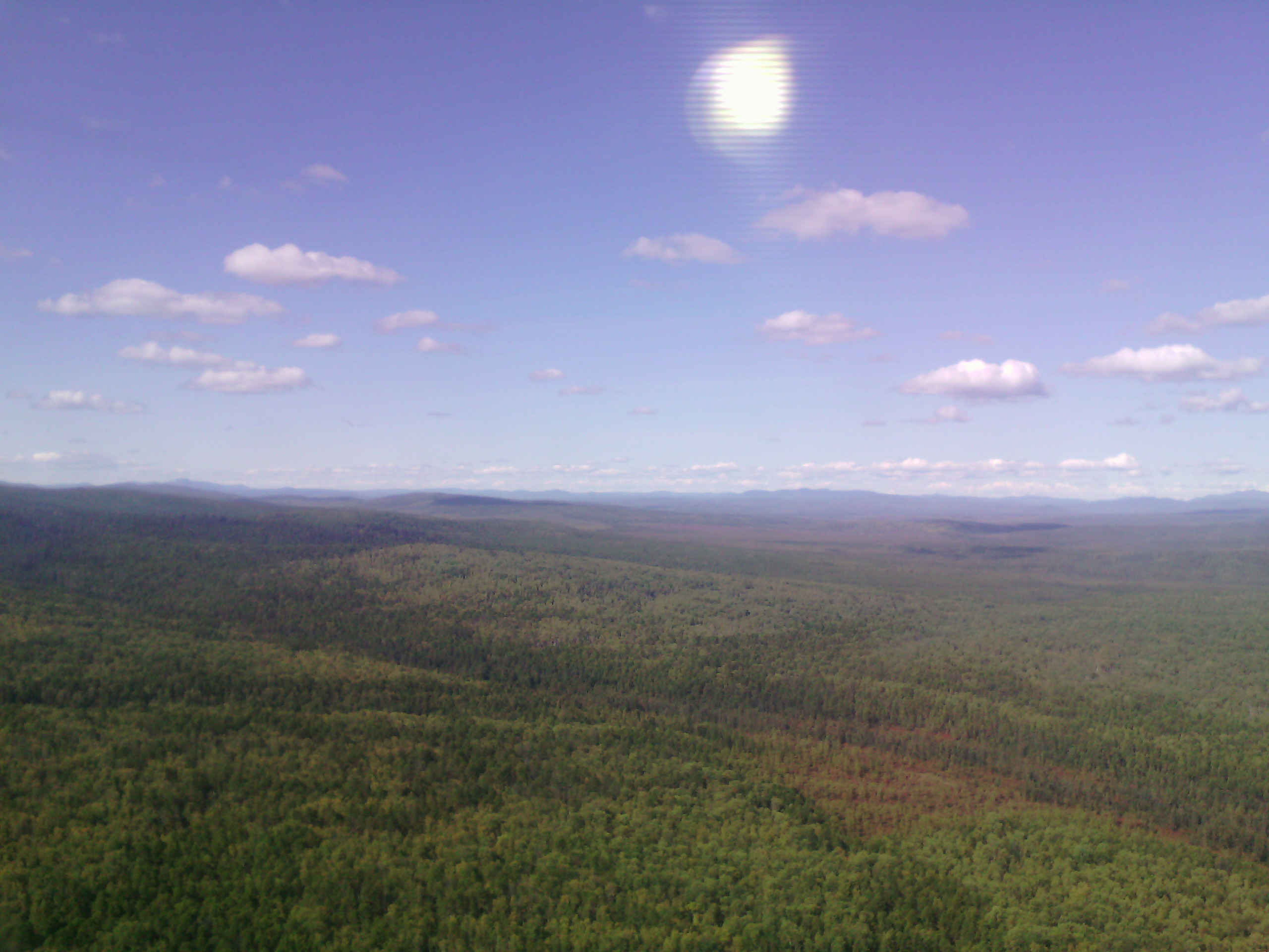 тайга селемджинского района